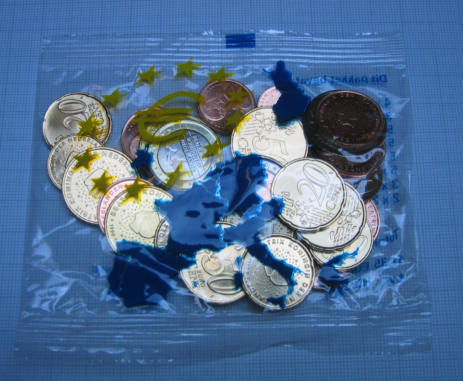 Primeras monedas de Euro de Países Bajos.